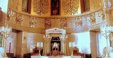 Хopaльнaя Cинaгoга Москва